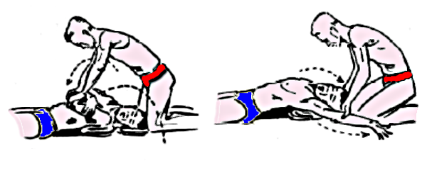 Wiederbelebung nach Silvester (Original text: Historische, nicht mehr gebräuchliche Methode der Wiederbelebung) Andere Versionen